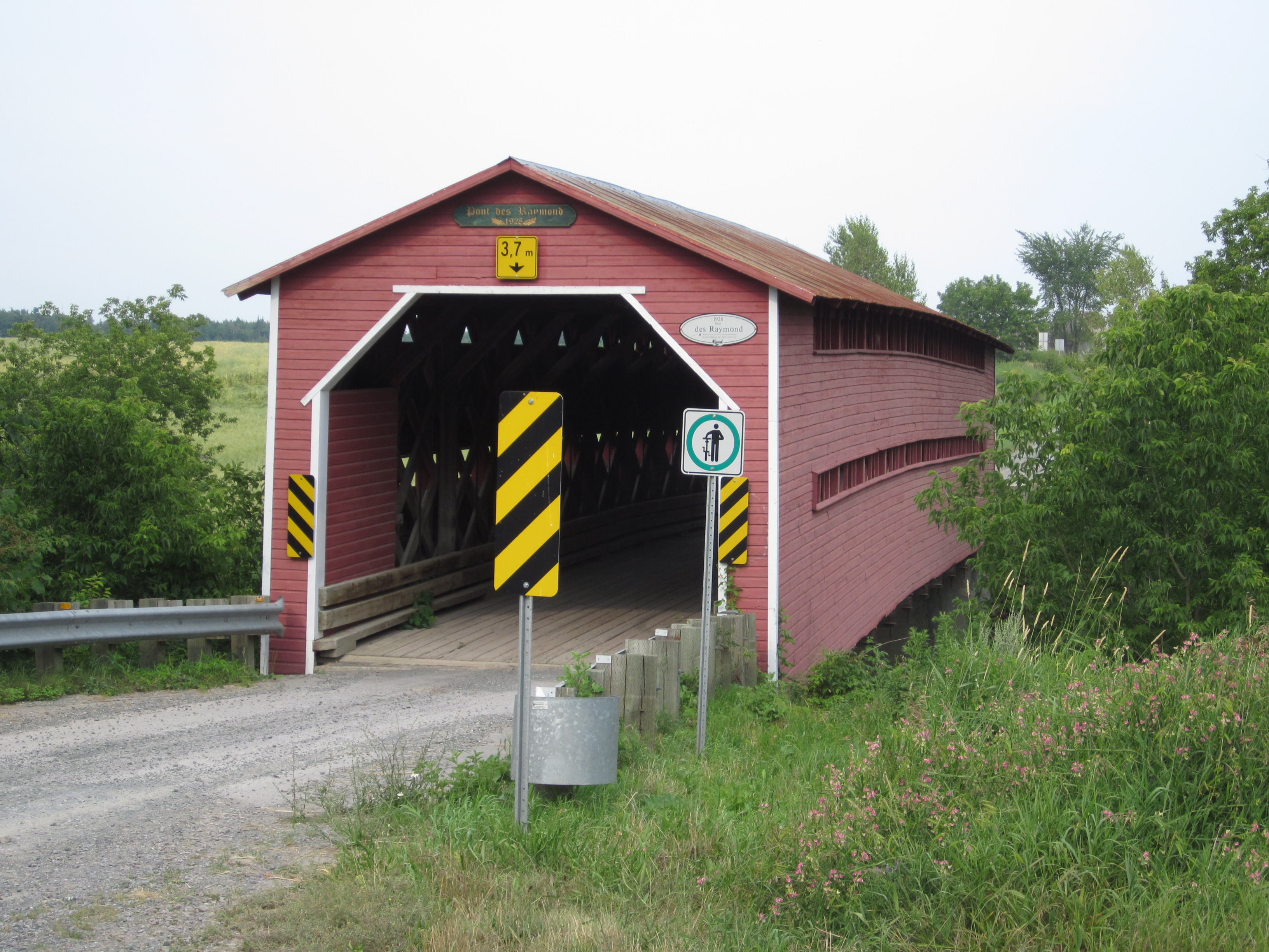 Le pont des Raymond à Bécancour vu du Nord